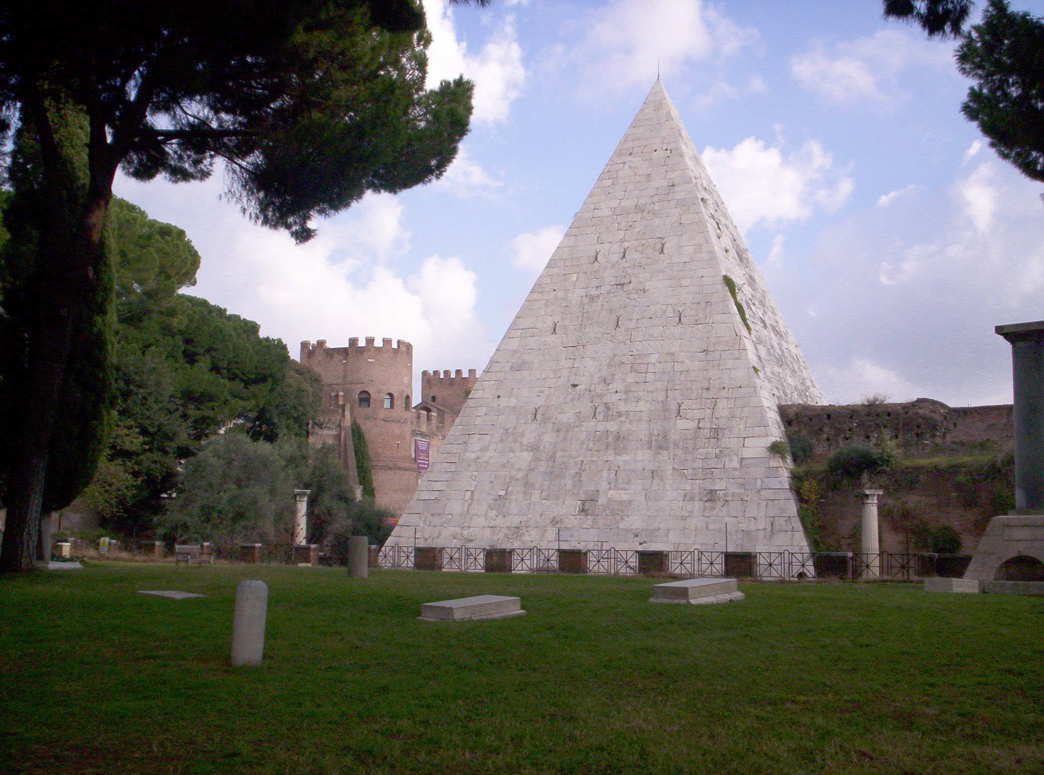 Piramide di Caio Cestio in Rome; at left side Porta San Paolo, at right side Mura Aureliane.